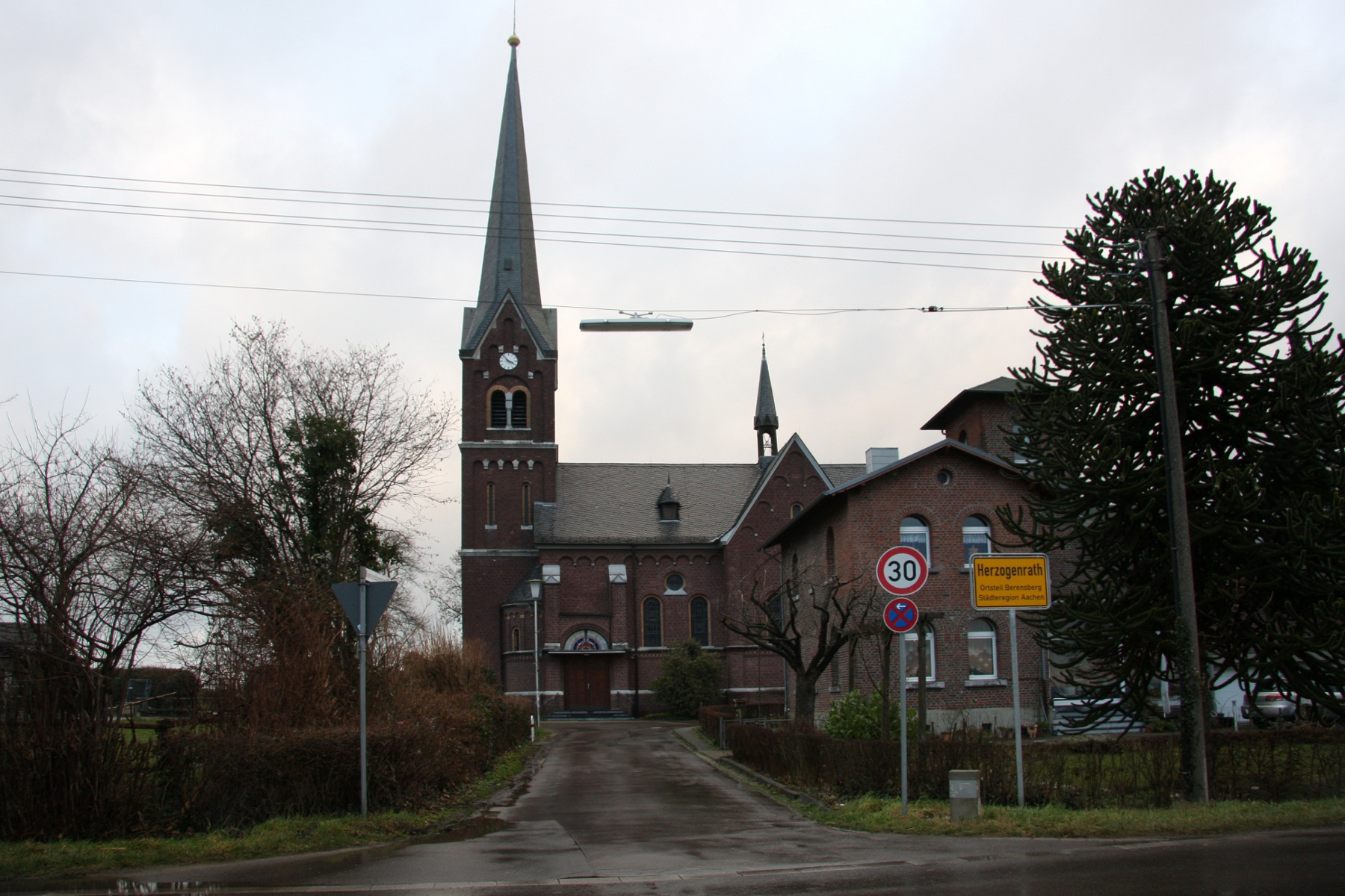 Baudenkmal Herzogenrath, Kath. Pfarrkirche St. Matthias, Kohlscheid, Berensberger Straße 34